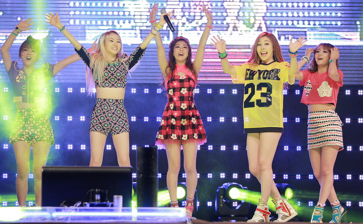 레이디스코드 (LADIES' CODE) 예뻐 예뻐 화성 51사단 한마음 음악회